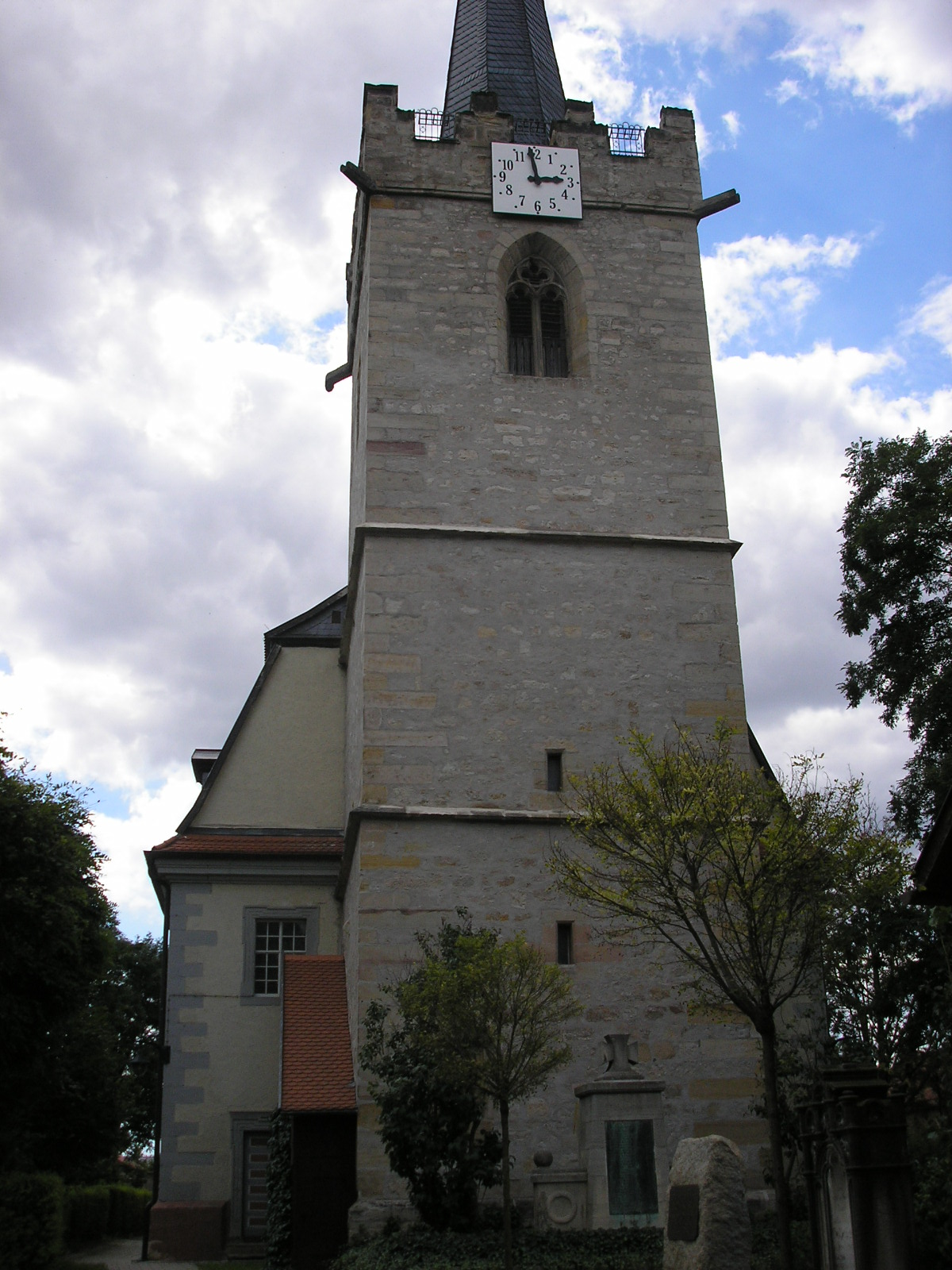 Die Kirche von Kerspleben bei Erfurt.